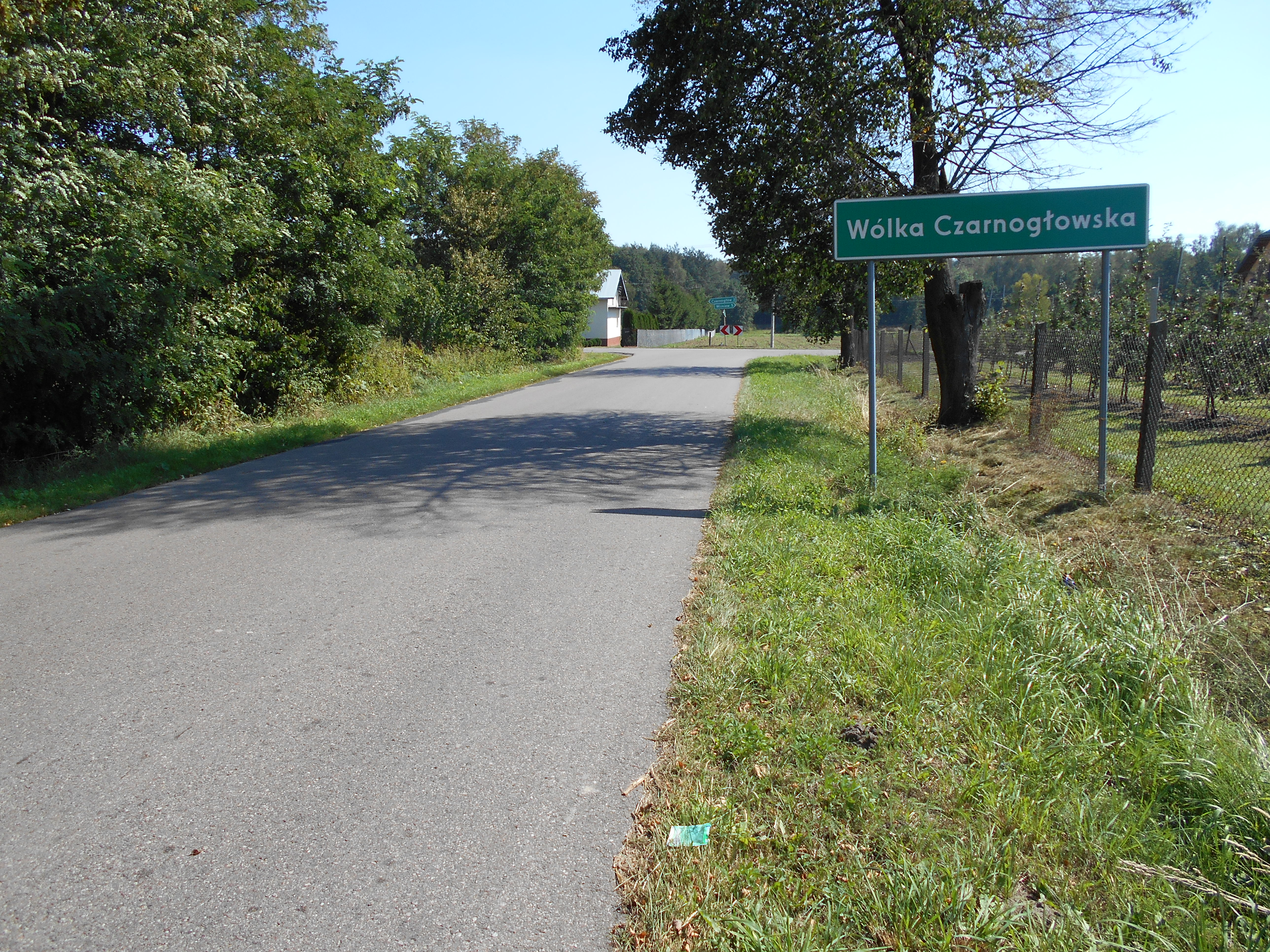 Miejscowość w gminie Dobre